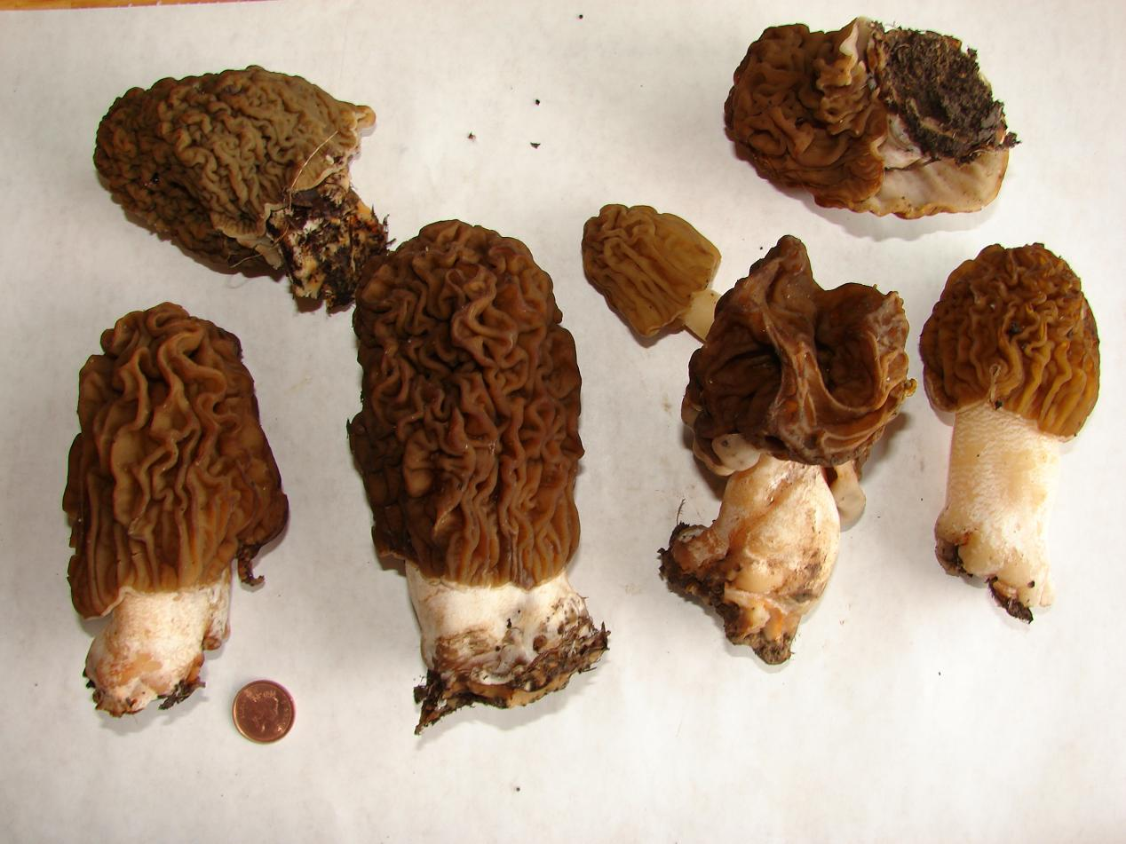 Ptychoverpa bohemica (Krombholz) Boudier